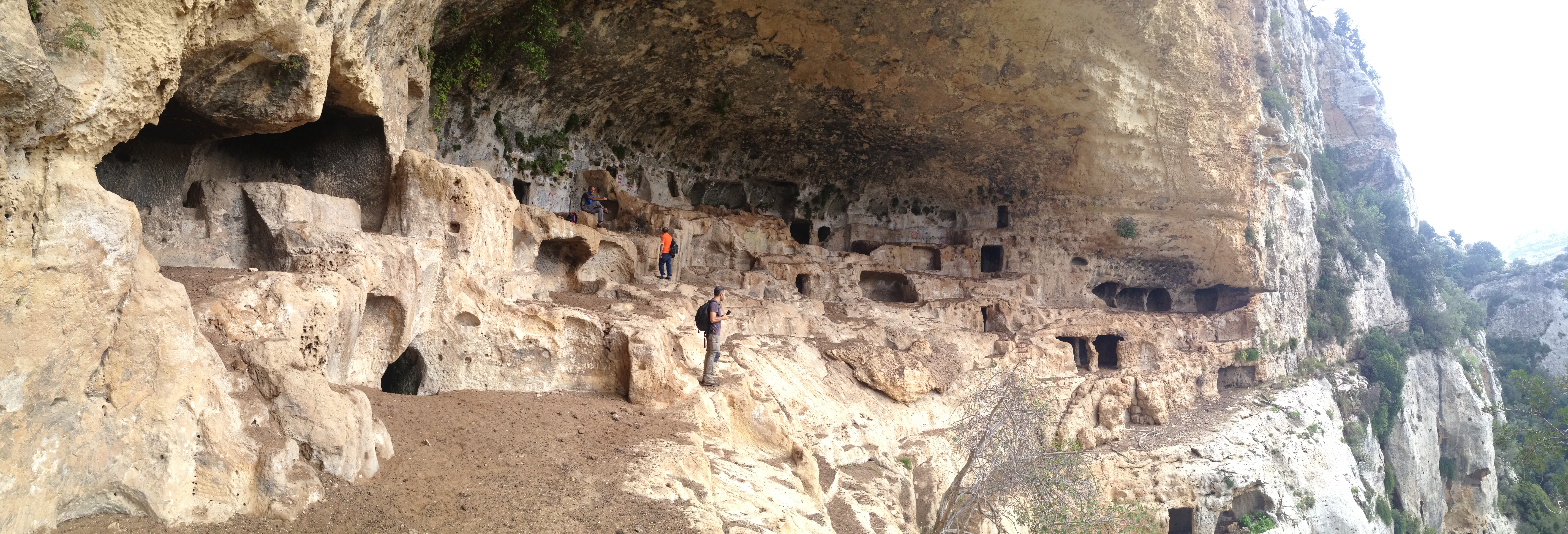 La grotta